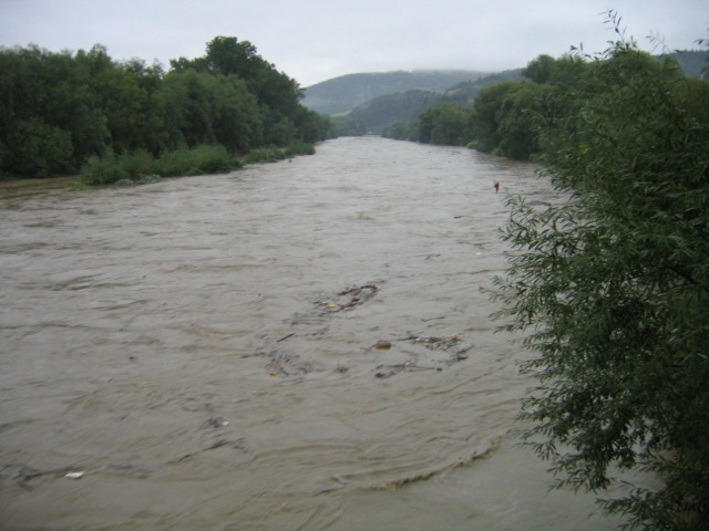 Rieka Kysuca počas výdatných zrážok v septembri 2007 Fotografia pri Kysuckom Novom Meste (rovnako ako Kysuca.jpg)